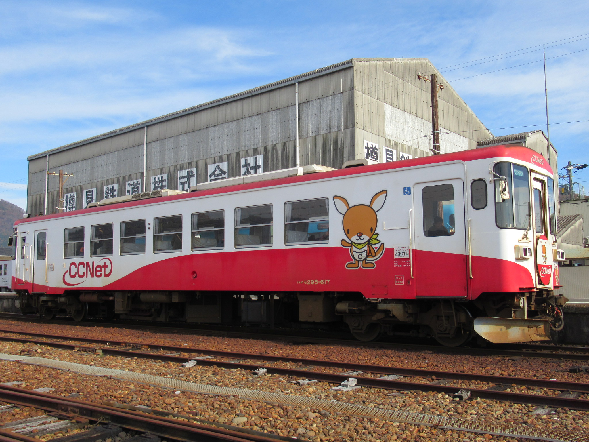 樽見鉄道 ハイモ295-617 本巣駅